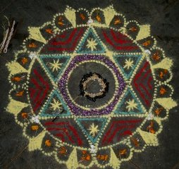 नेपाली: षट्कोणाकार म्हः पूजा मण्डल